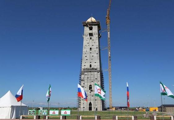 Башня Согласия - Magas Tower